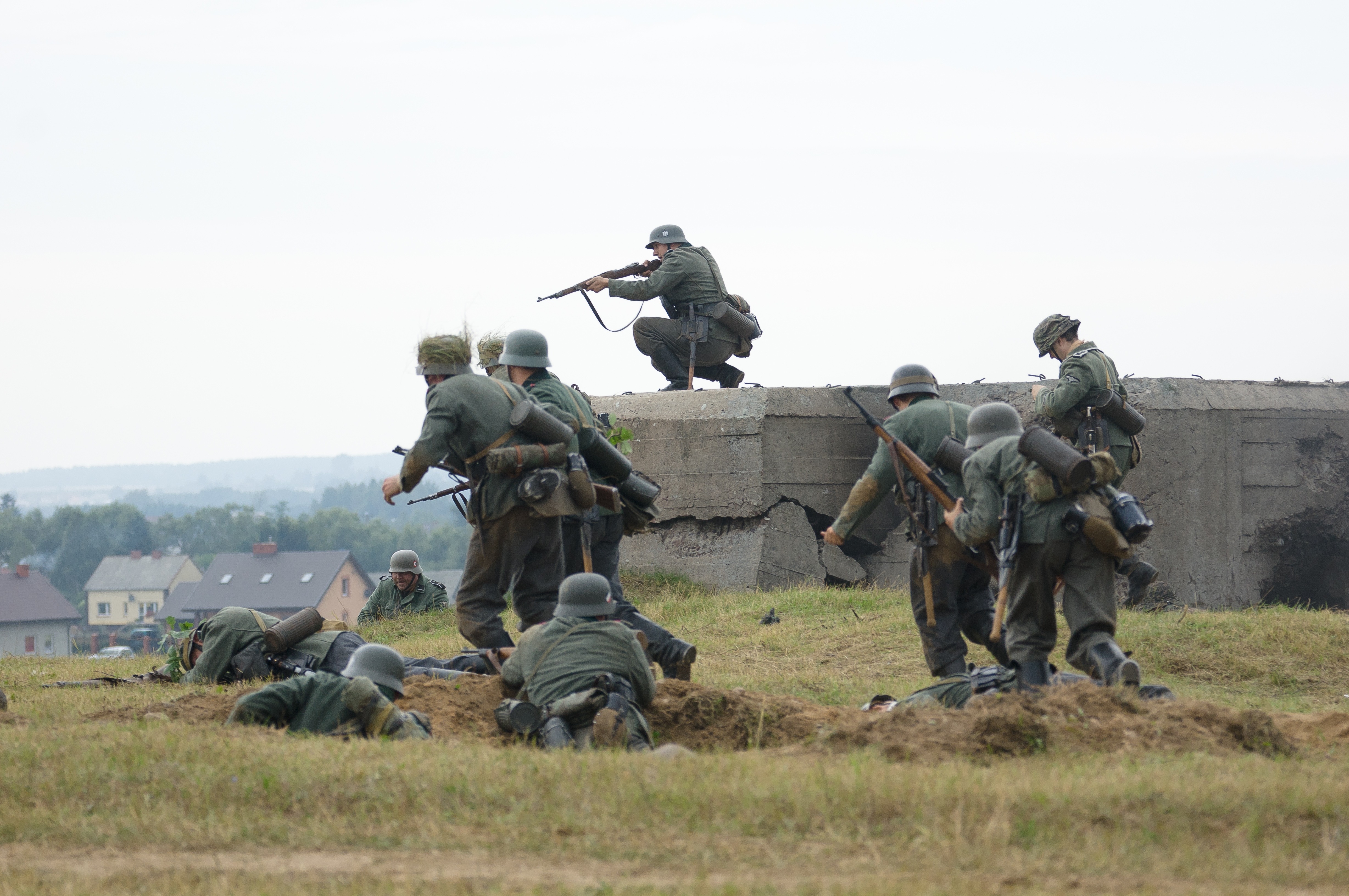 V rekonstrukcja Bitwy pod Mławą, 1. września 2012.